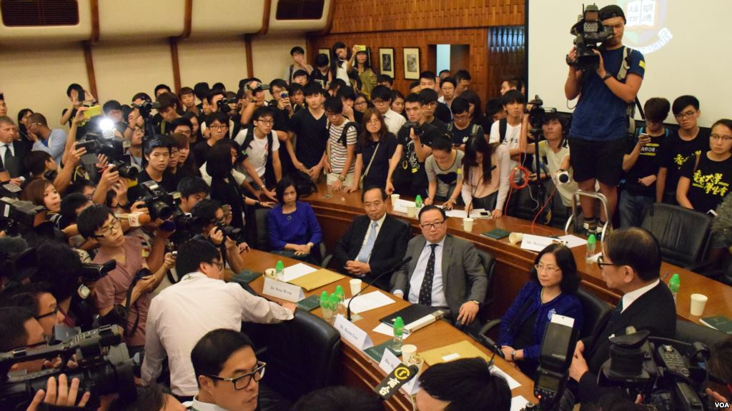 中文（香港）: 香港大學副校長任命事件